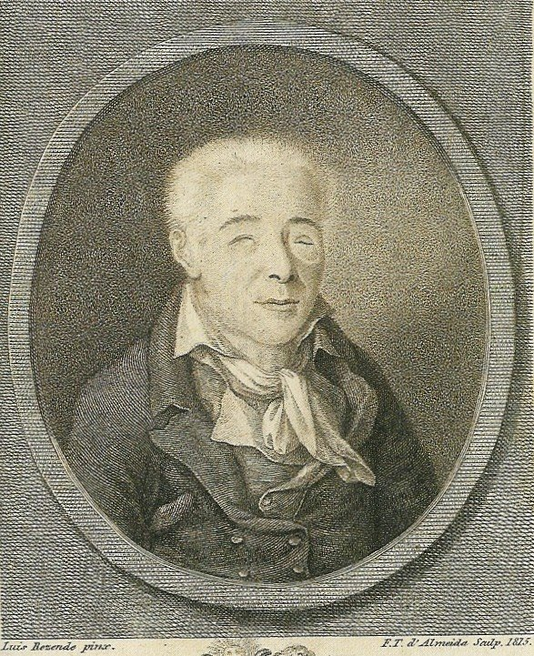 O ficheiro é de uma gravura que representa o poeta português Tomás Santos e Silva